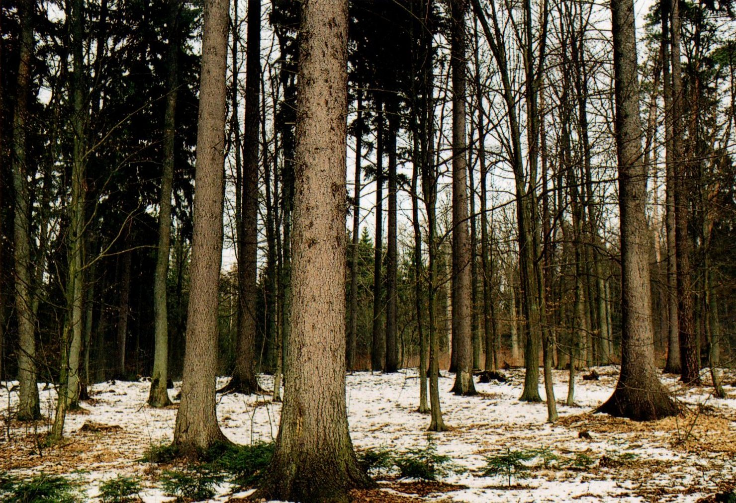 Autor: Adrian Grzegorz Rok wykonania: 2002